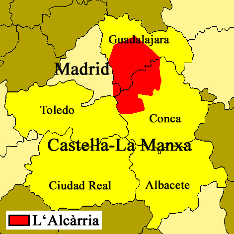 Map of the Alcarria region, in Spain (names are written in Catalan)Mapa de la comarca de la Alcarria (nombres en catalán).